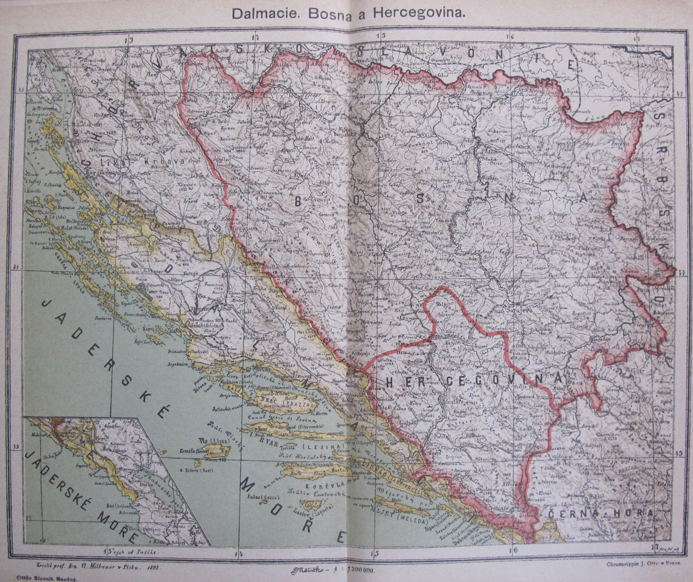 Původní popisek: Dalmacie, Bosna a Hercegovina.